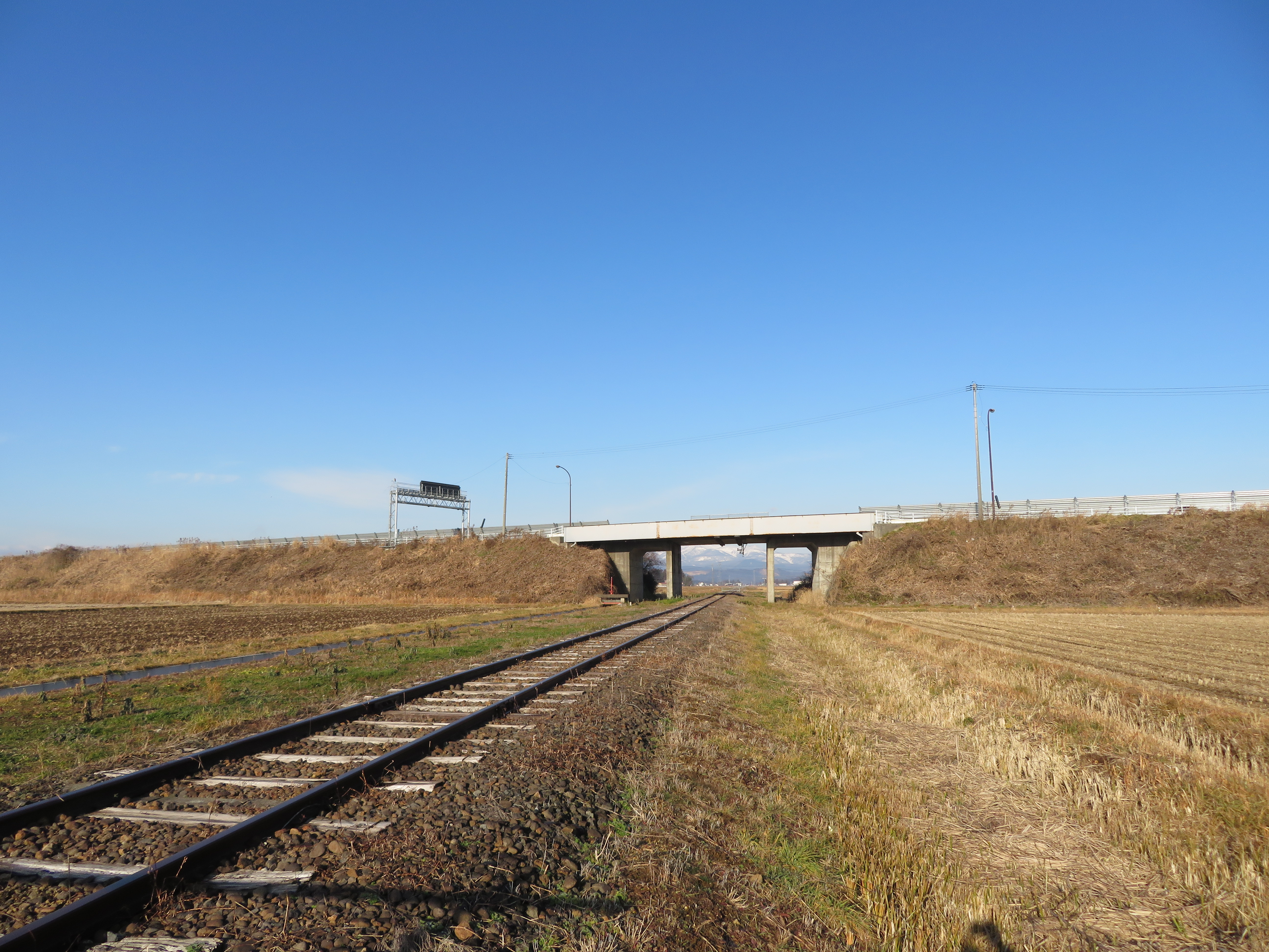 国道4号線金成バイパスとくりはら田園鉄道線との交差部付近 Canon PowerShot SX720 HS